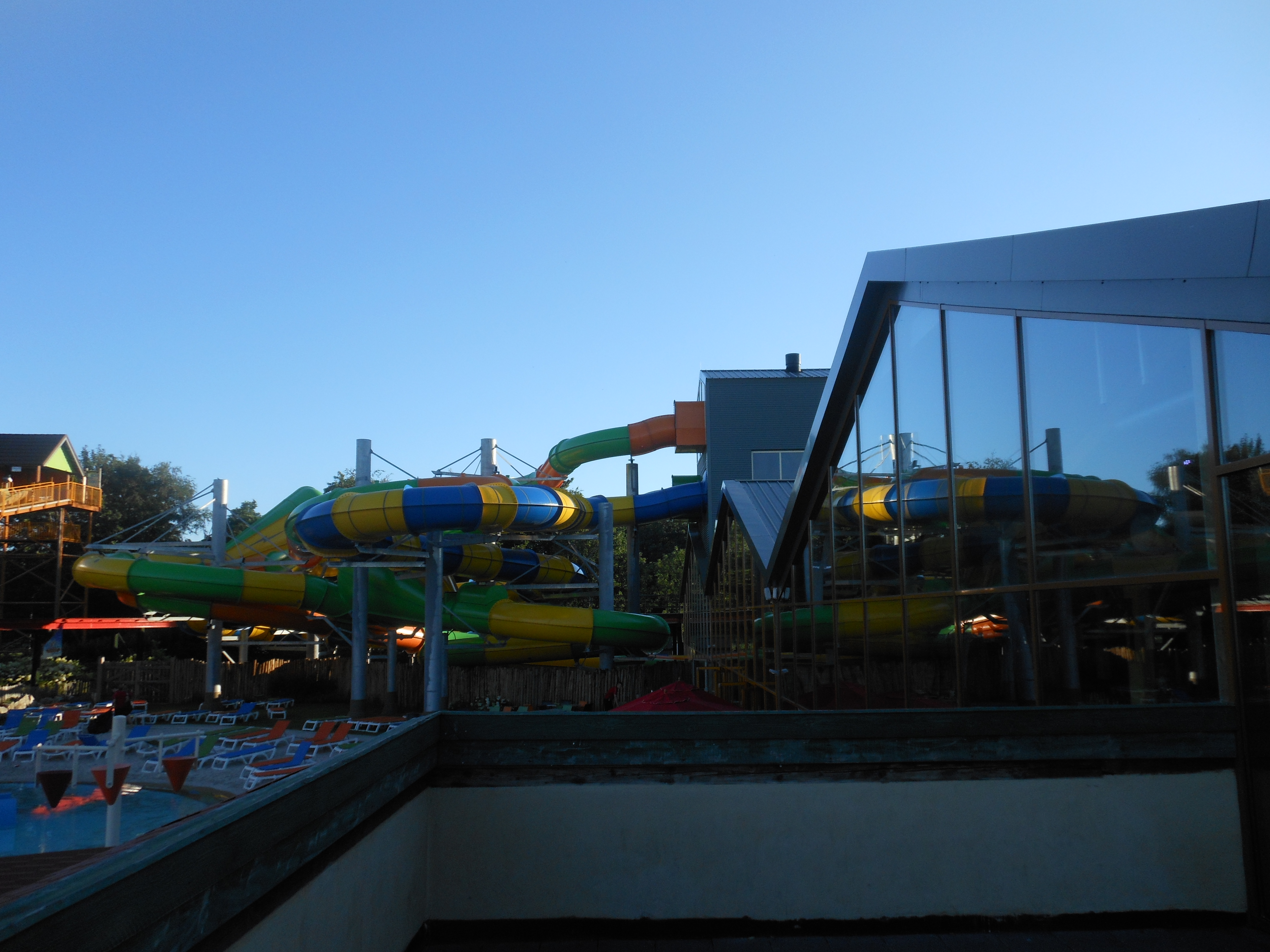 Het buitengedeelte van Aqua Mexicana, het in 2015 geopende zwemparadijs van Vakantie- & Attractiepark Slagharen in Overijssel, Nederland. Gefotografeerd vanop de balustrade die toegankelijk is vanuit het attractiepark.